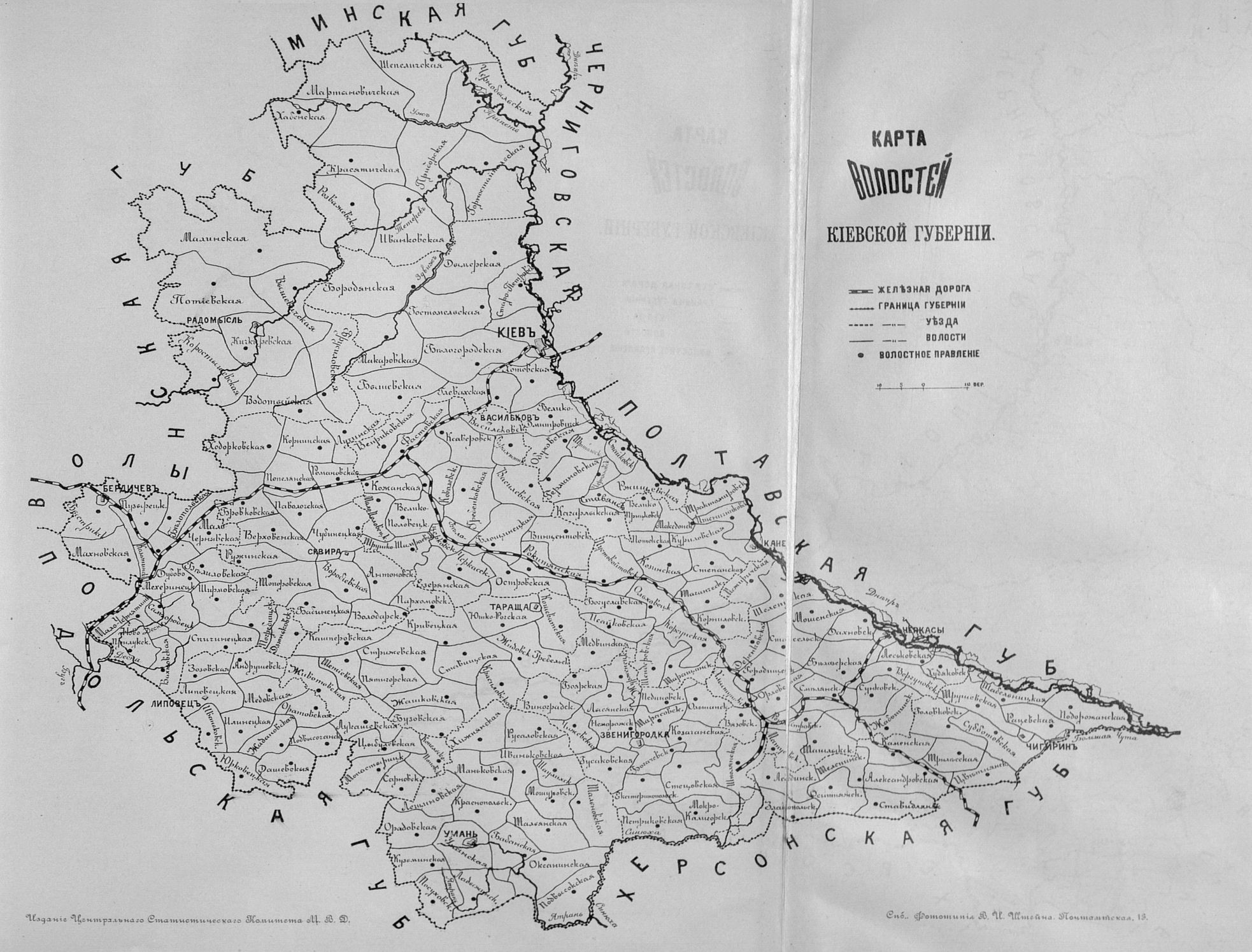 Карта волостей Киевской губернии